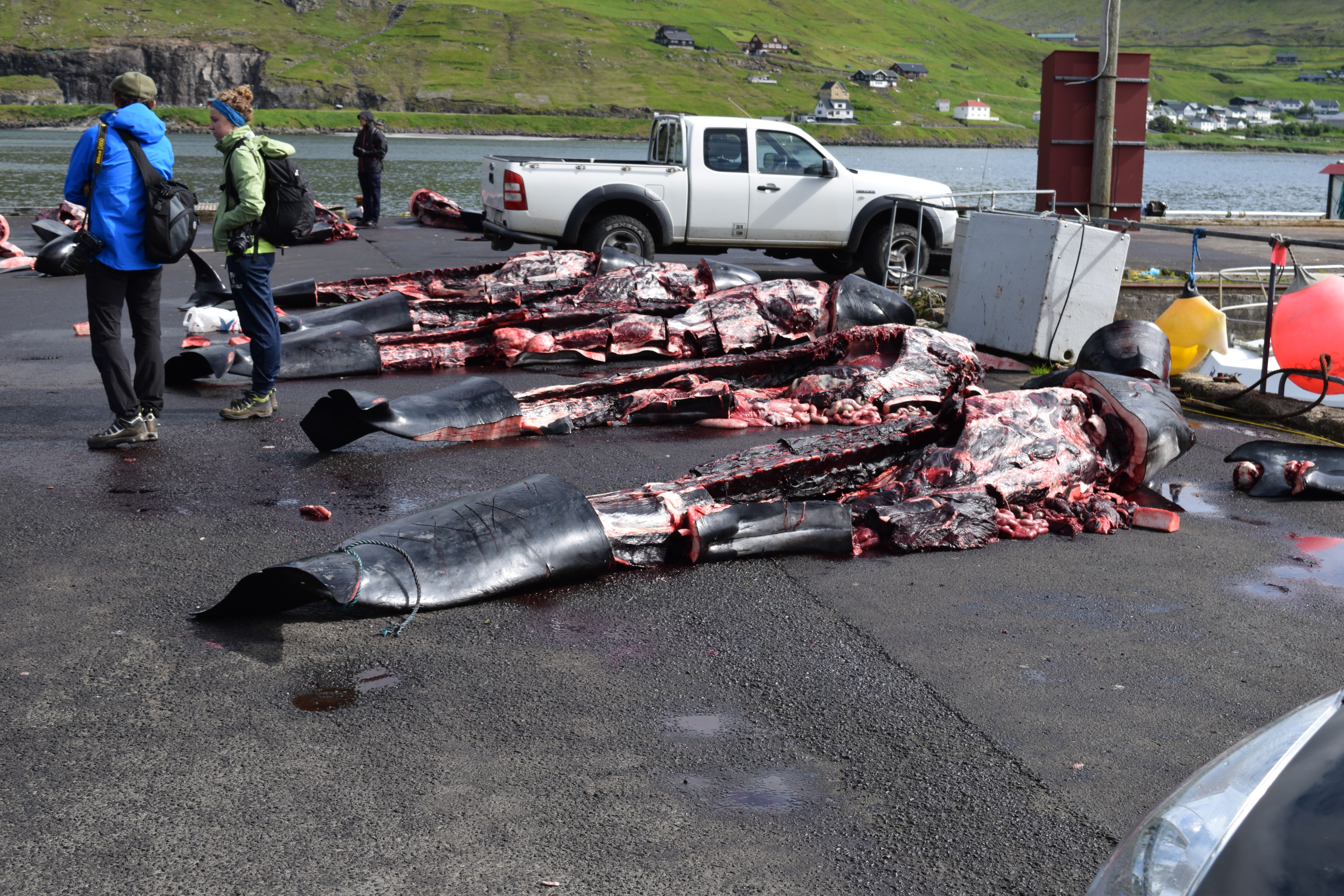 Tag nach einer Waljagd vor der Insel Vagar